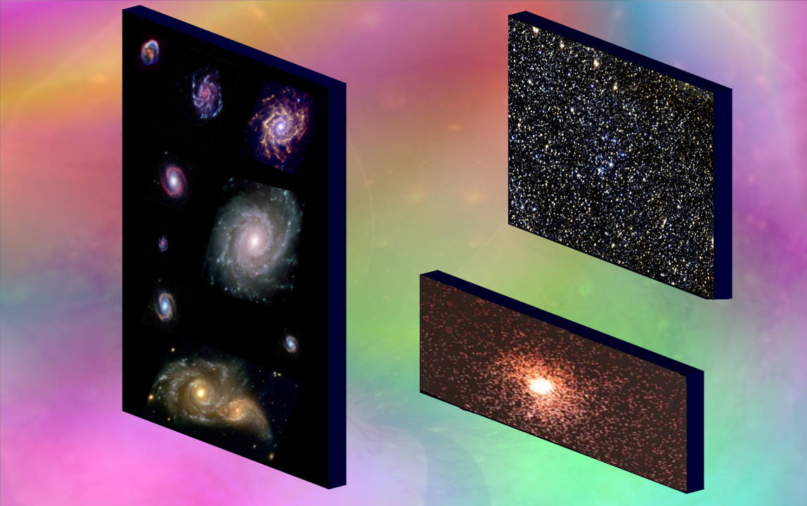 Image illsutrant très shématiquement la cosmologie branaire. Auteur : Rogilbert